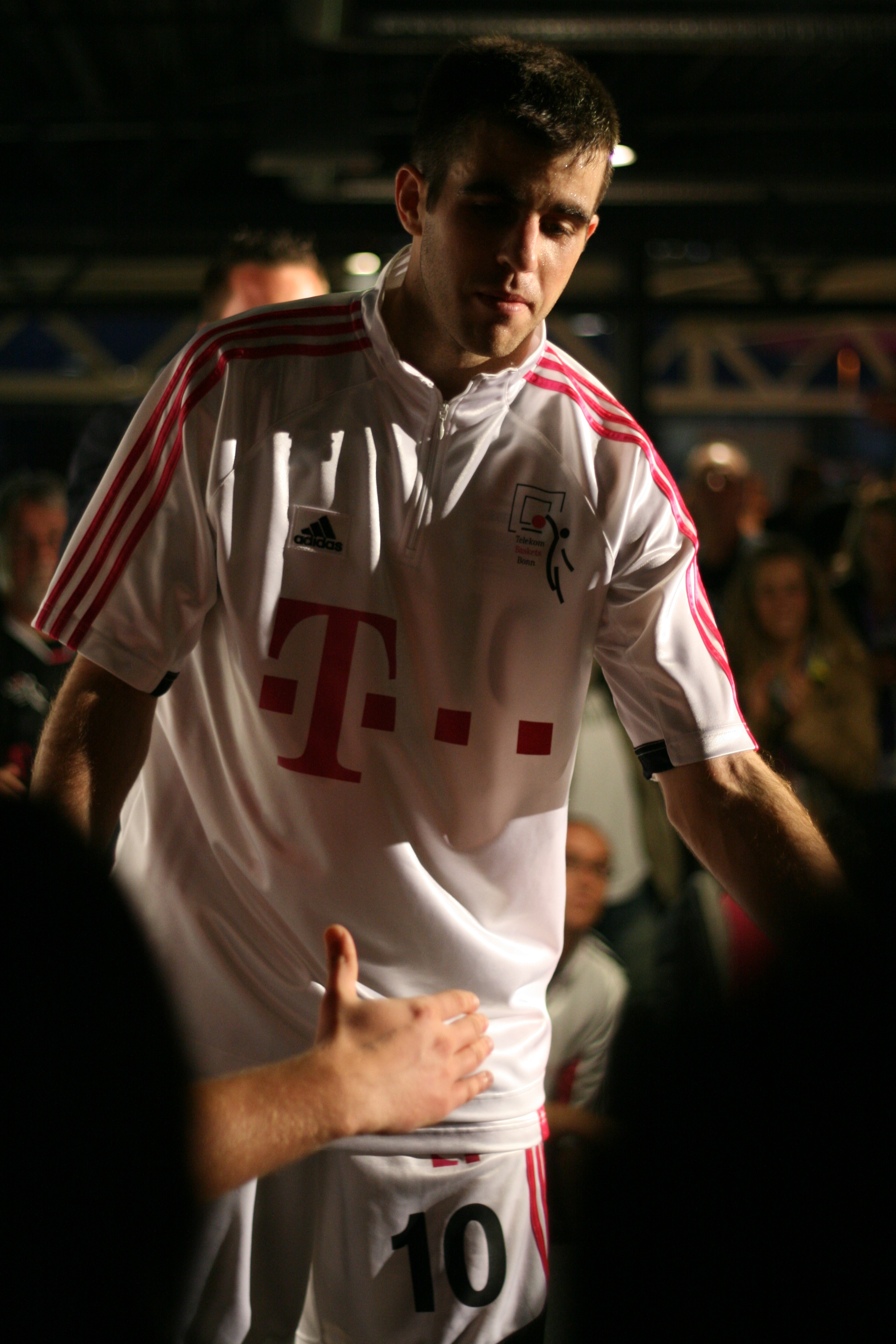 Jared Jordan, Telekom Baskets